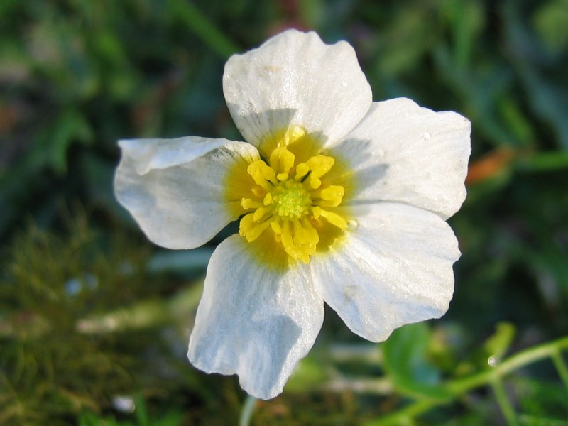 Blüte des Wasser-Hahnenfußes Ranunculus aquatilis